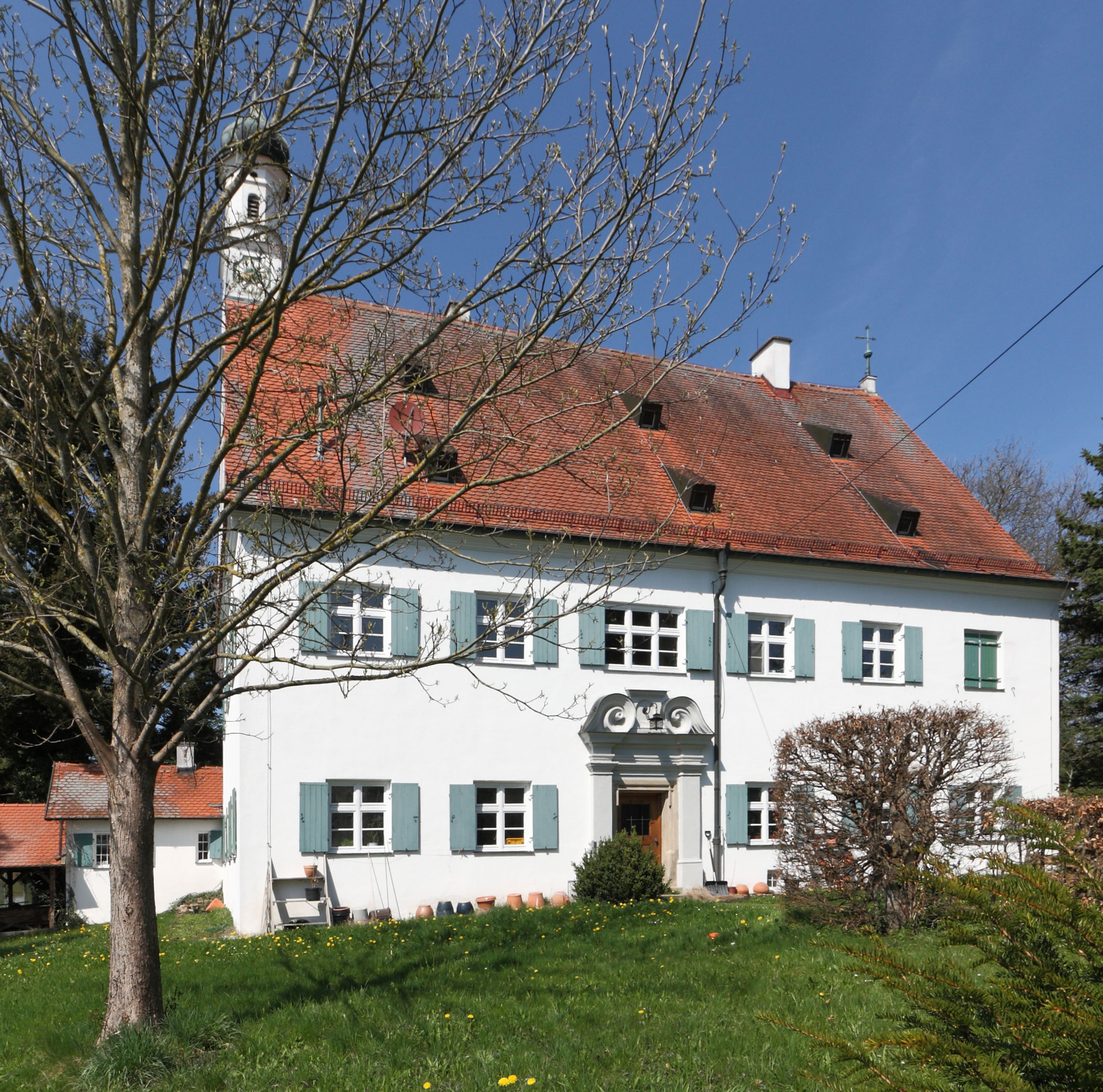 Ehemaliges Amtshaus der Ortsherren "Heilig-Geist-Spital Augsburg", das 1515 erbaut und in der jetzigen Form 1663 umgebaut wurde; Südansicht